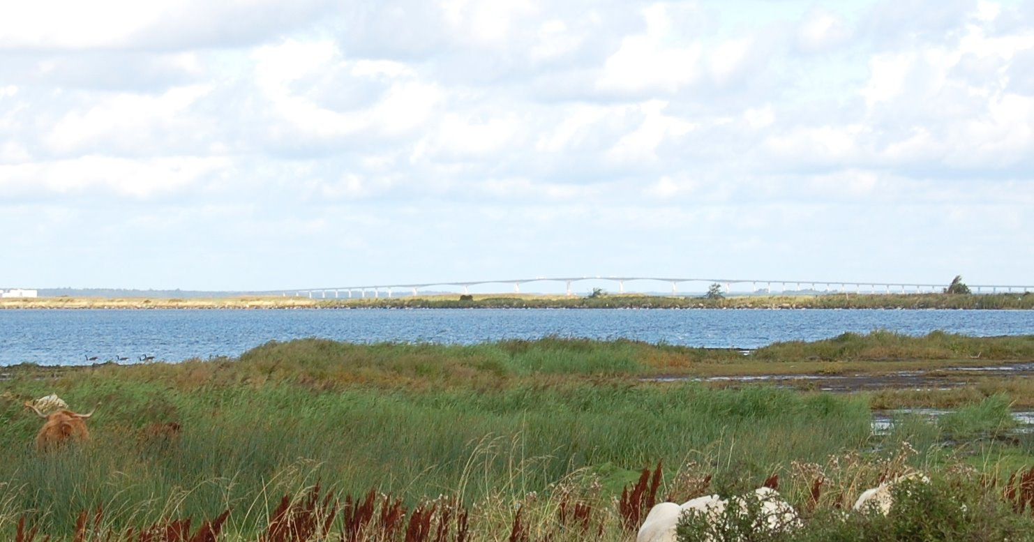 Beijershamn, Blick aus südlicher Richtung, im Hintergrund Ölandsbron